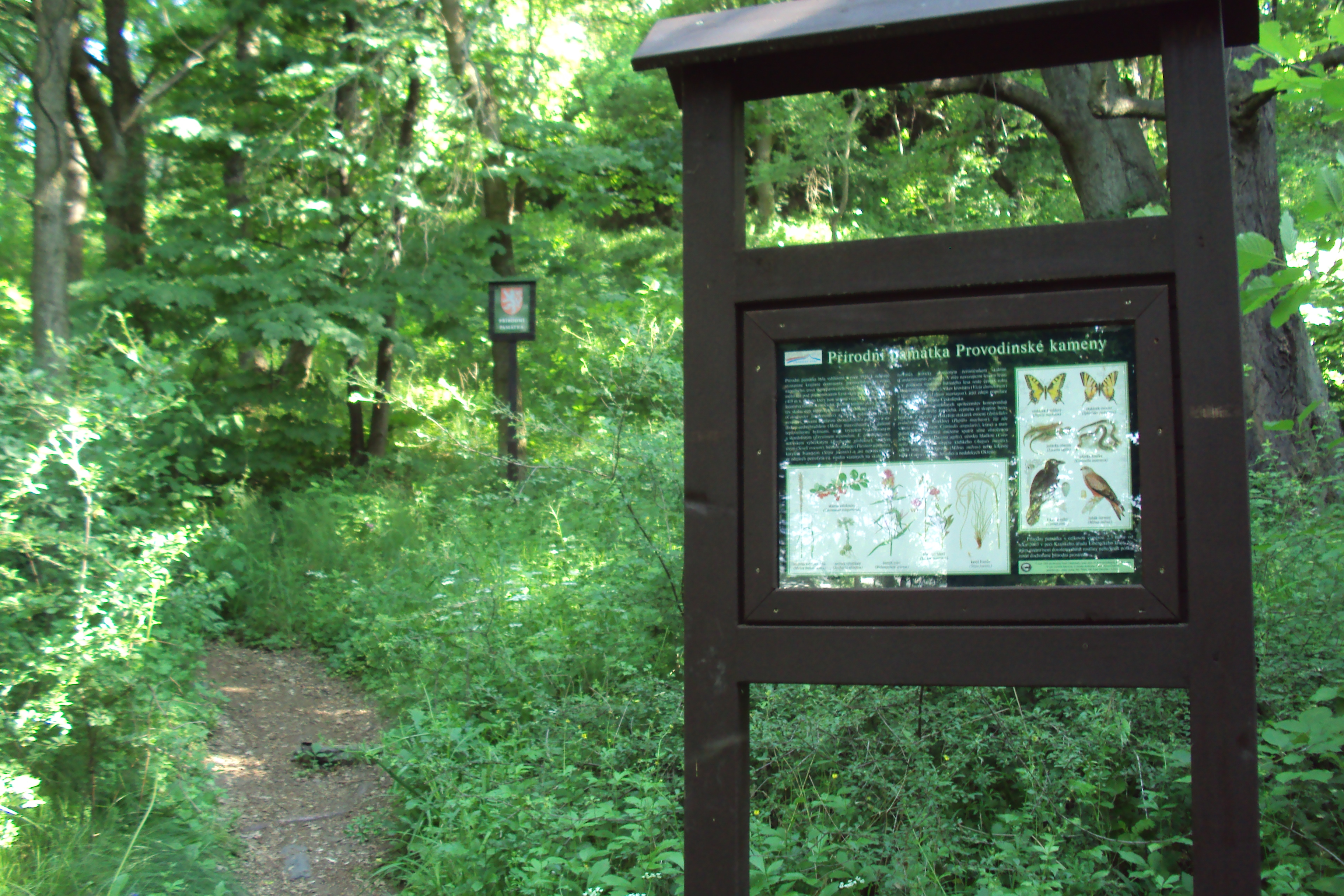 Přírodní památka Provodínské kameny, cedule z úpatí Lysé skály